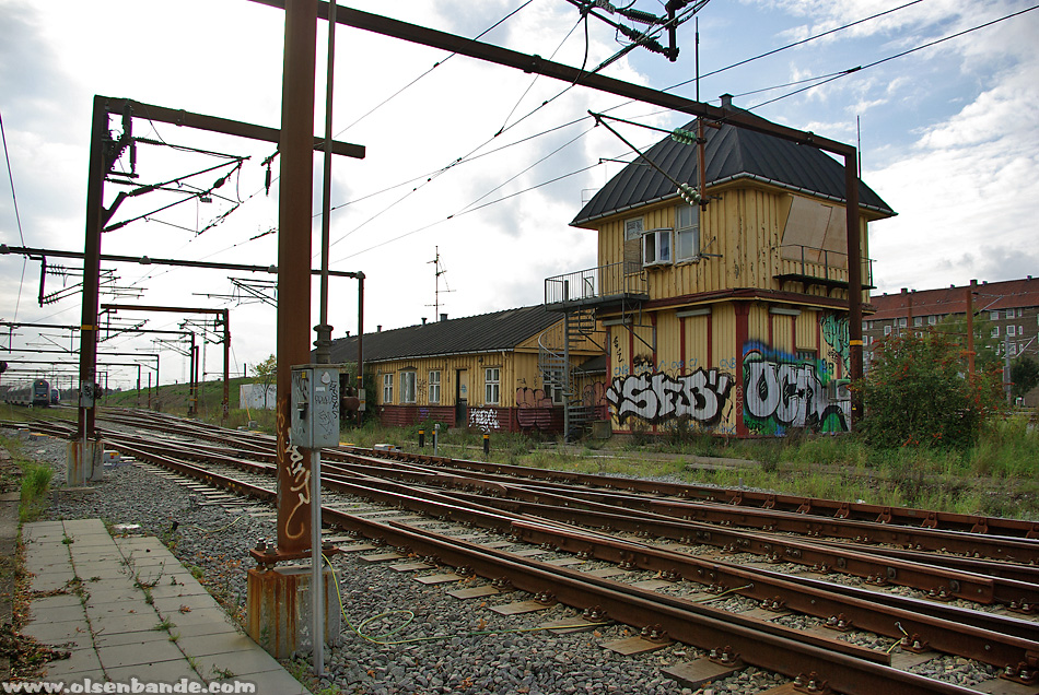 Das Gebäude ist vor allem aus dem Film "Die Olsenbande stellt die Weichen" bekannt.